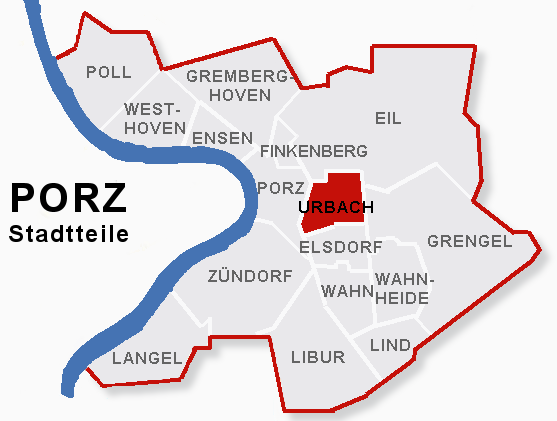 Lage des Stadtteils Urbach im Stadtbezik Porz